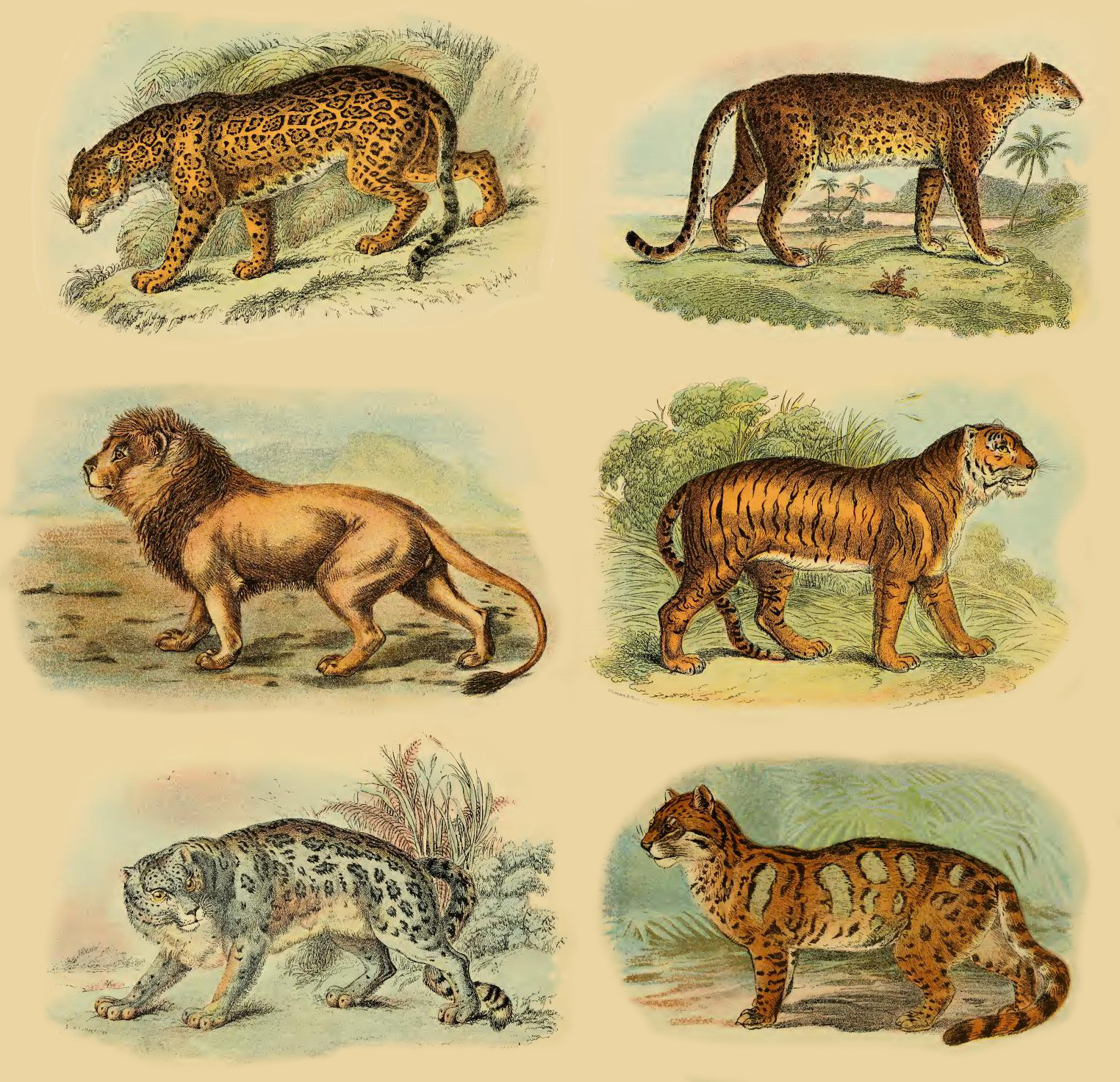 Collage de six félins appartenant à la sous-famille des Pantherinae. De gauche à droite et de haut en bas : jaguuar, léopard, lion, tigre, once et panthère nébuleuse.